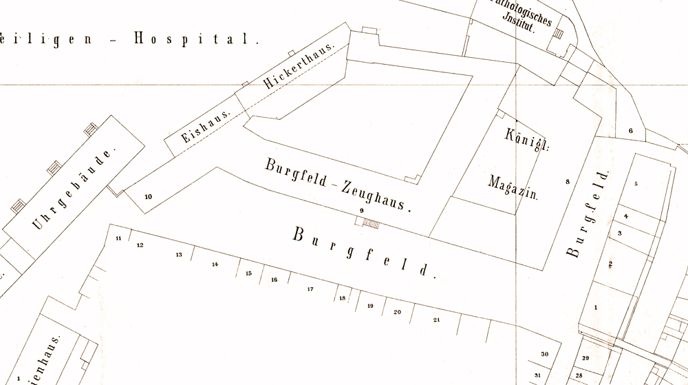 Ulica Antoniego Cieszyńskiego (Burgfeld) - fragment planu sekcyjnego miasta z roku 1884